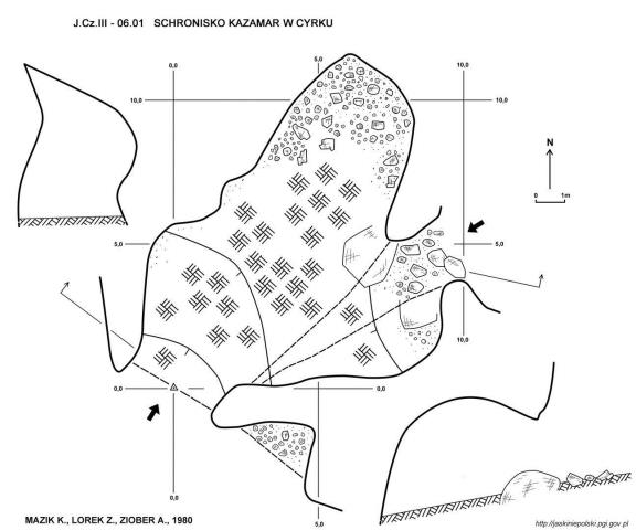 Schronisko Kazamar w Cyrku - plan